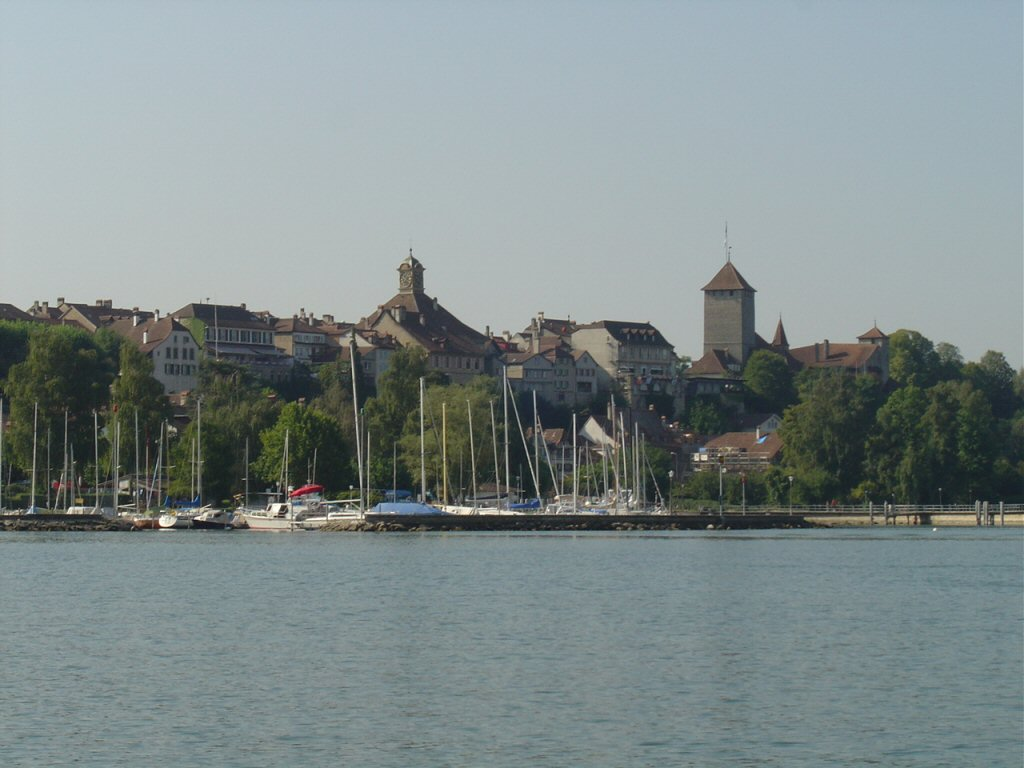 Murten / Morat.